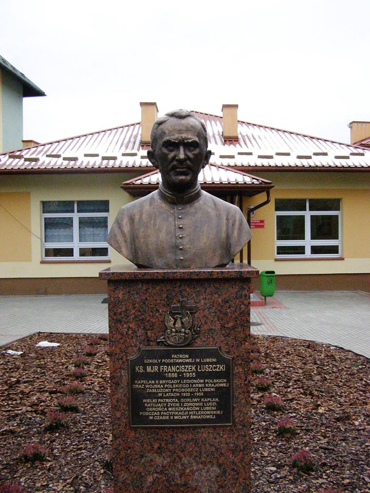 Popiersie ks. Franciszka Łuszczki przed Szkołą podstawowa w Lubeni